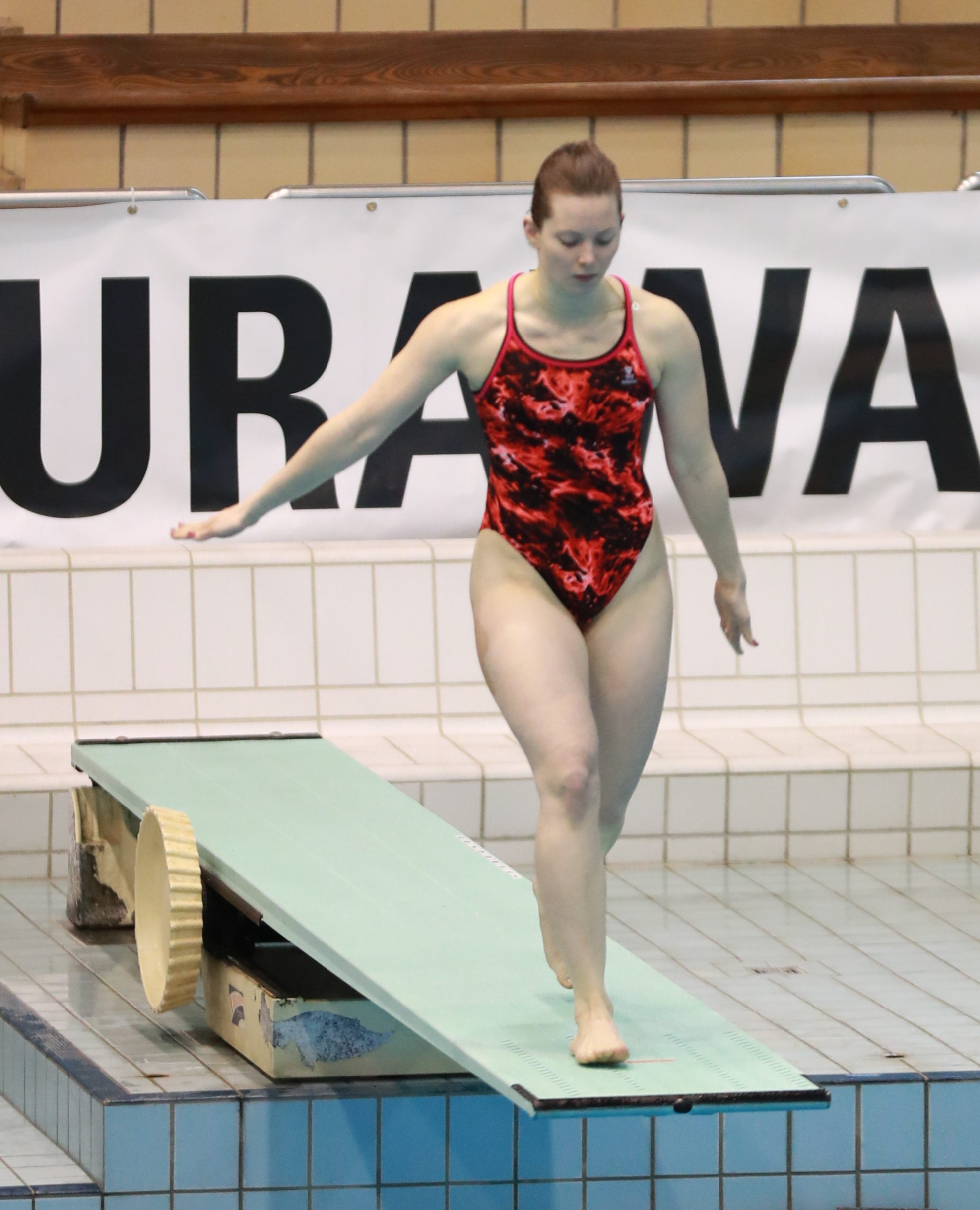 1m weiblich Vorkampf Sprung 2 bei den Internationalen Deutschen Hallenmeisterschaften im Wasserspringen Offene Klassen und Junioren. Abgebildet: Jessica Favre.